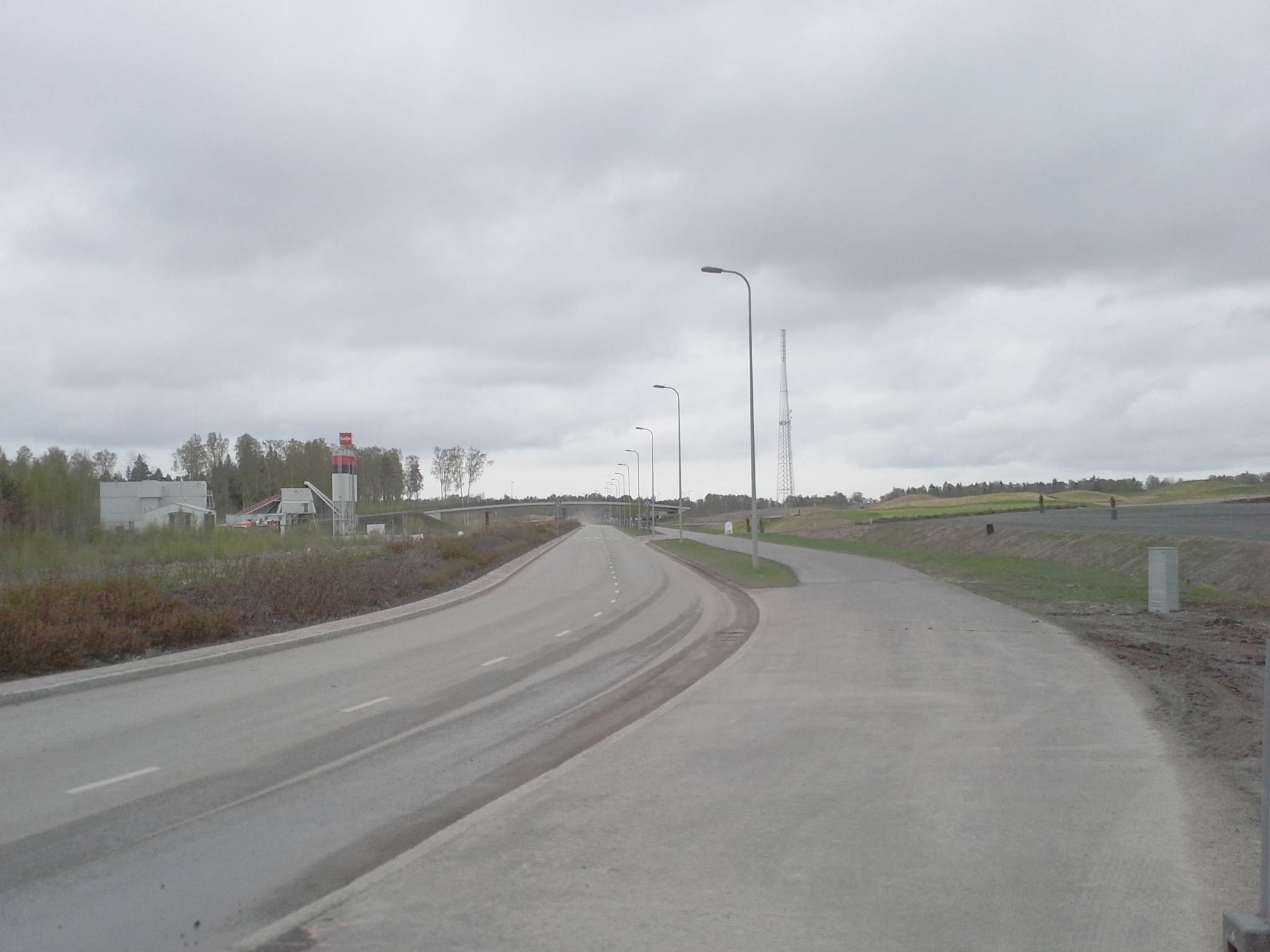 Turveradantie Turvesuontieltä etelään